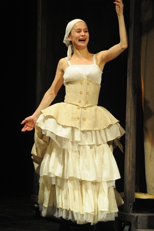 לוסי דובינצ'יק - דון ז'ואן